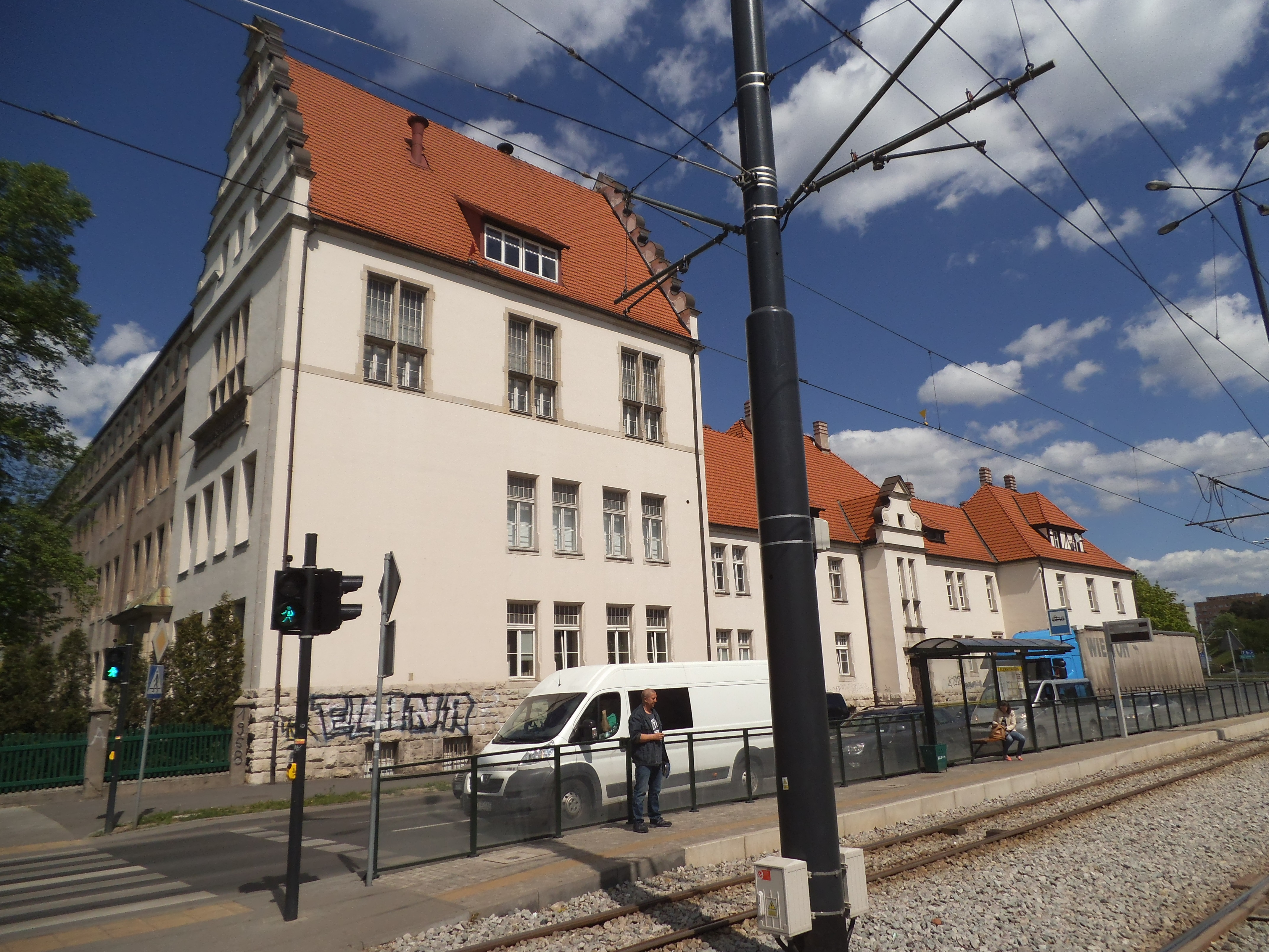 WSP TORUN